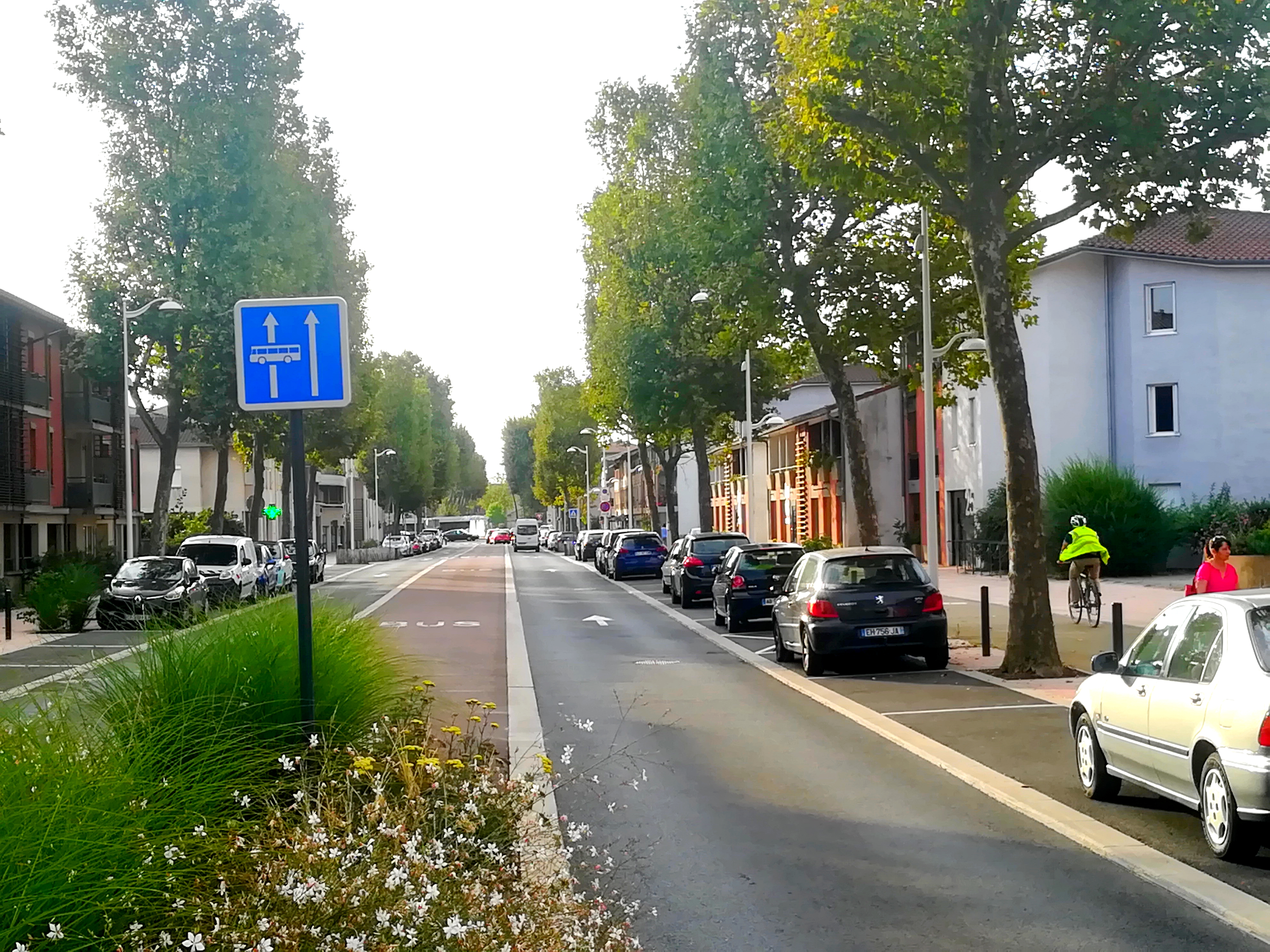 Le boulevard Eugène Montel à Tournefeuille, avec le couloir de bus central.